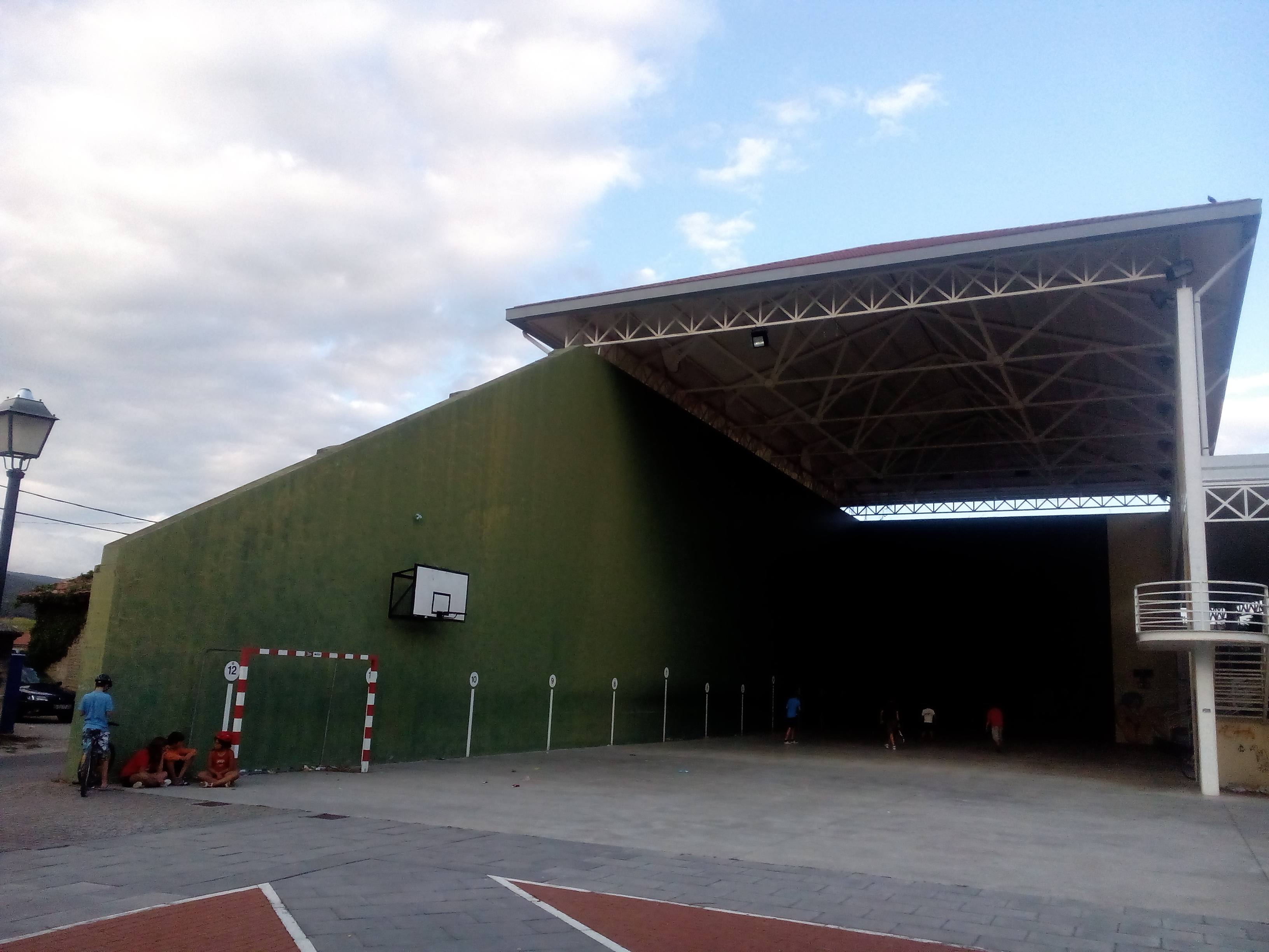 Espejoko (Gaubea, Araba) pilotalekua